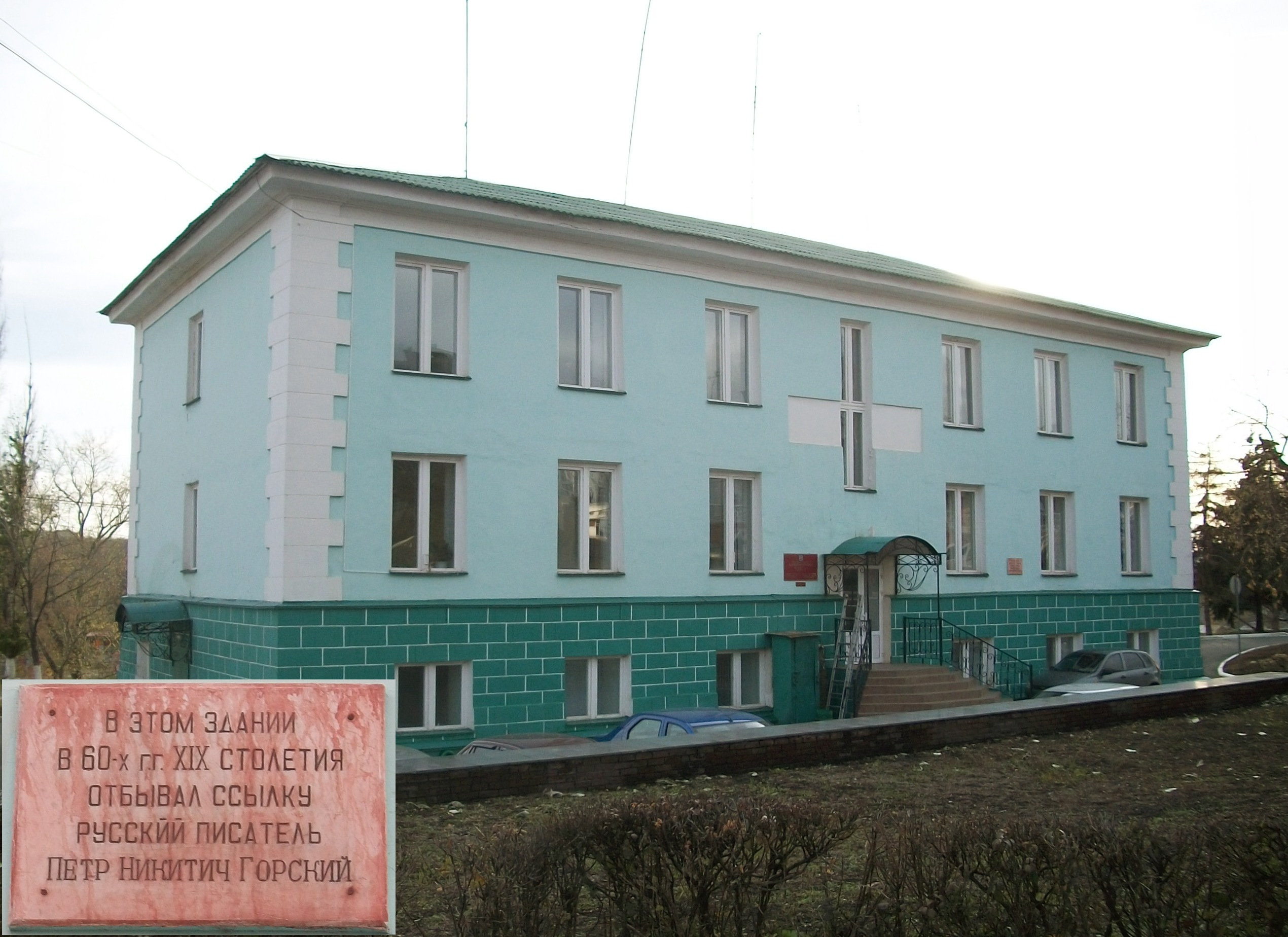 Здание в Саранске, которое в XIX веке было тюремным замком. Здесь отбывал ссылку русский поэт и литератор П. Н. Горский. В то время здание было обнесено высокой стеной. Сейчас здесь располагаются службы городской администрации.